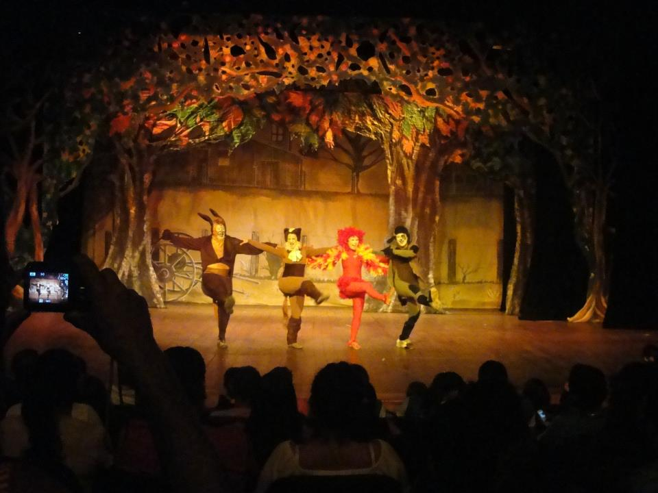 O GRUPO encenação cultural do Pará no Teatro da paz